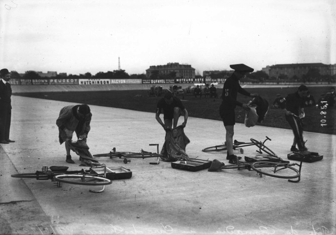 Photo prise à la fête de Comoedia (photographie de presse - Agence Rol)